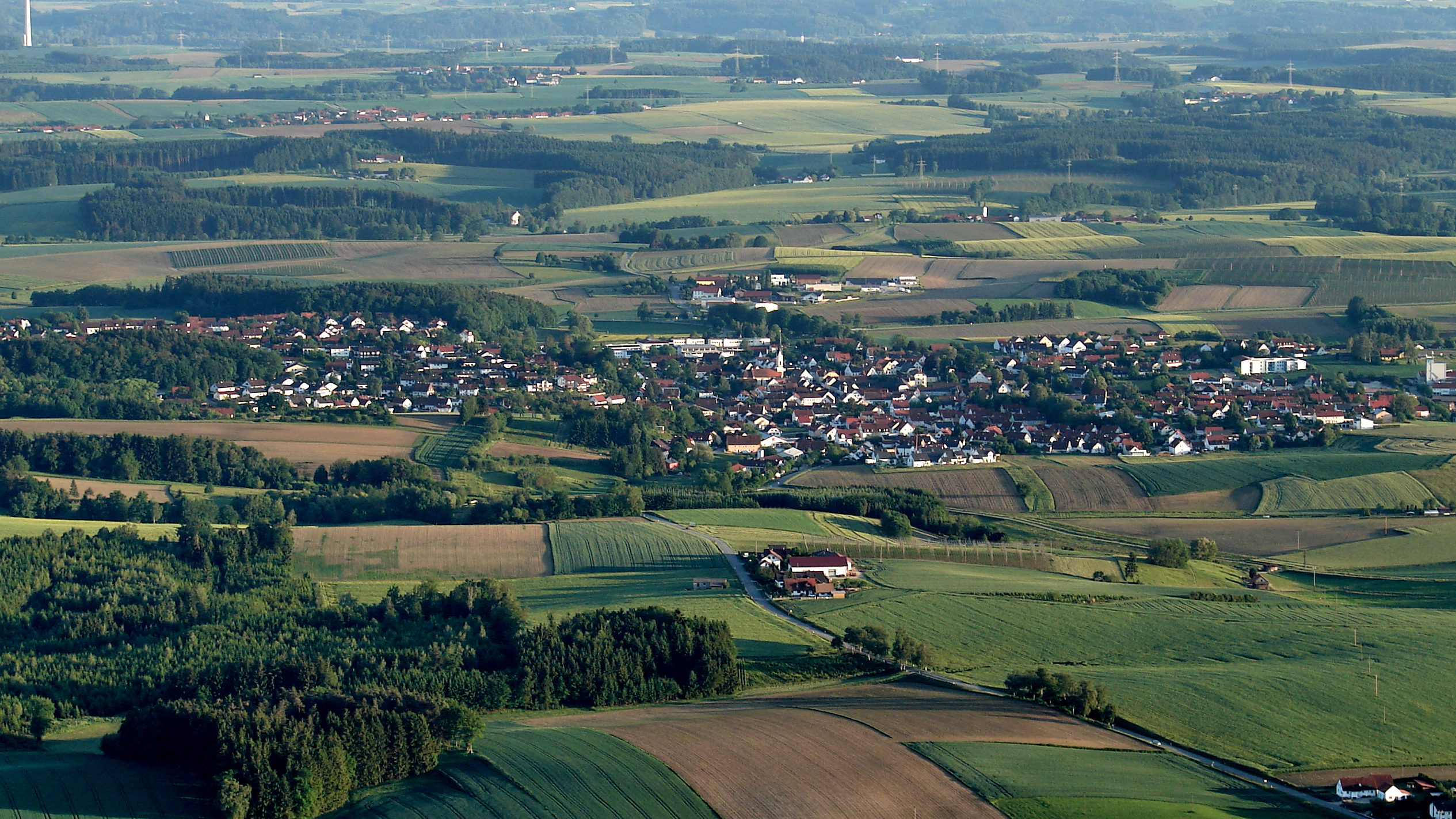 Nandlstadt ist ein Markt im oberbayerischen Landkreis Freising und gilt als ältester Hopfenanbauort der Welt.